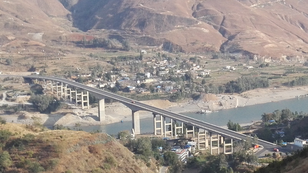 108国道鱼鲊金沙江大桥2015年建成通车，连接了会理县鱼鲊乡和攀枝花市大龙潭彝族乡拉鲊村，从此鱼鲊渡成为历史。照片是从攀枝花一侧远眺鱼鲊大桥和会理县鱼鲊乡。